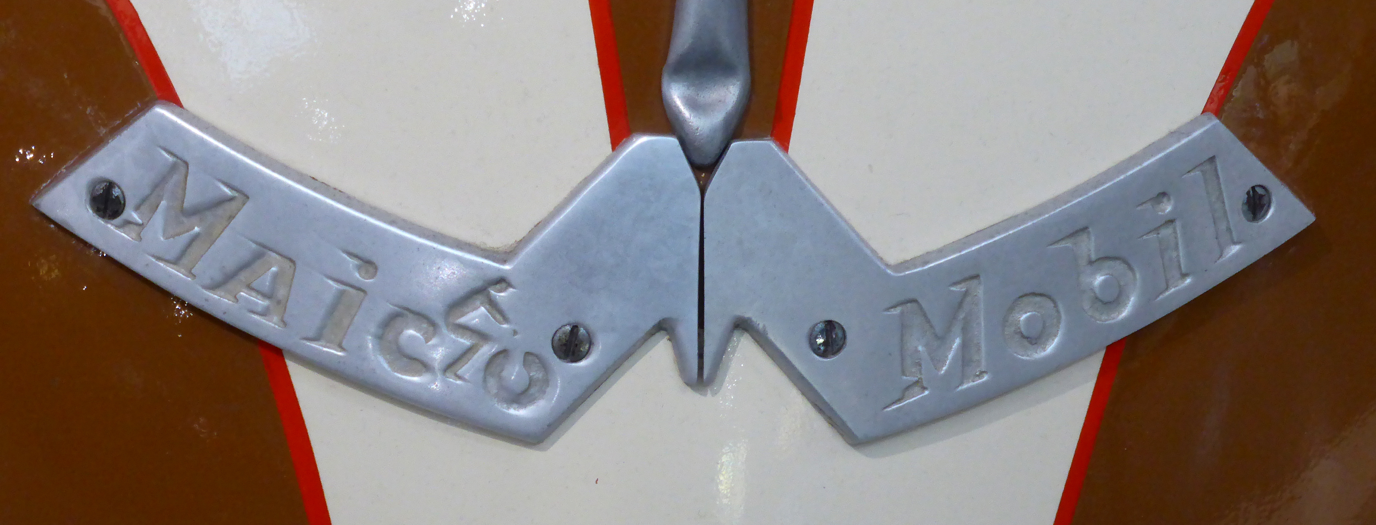 Maico-Mobil Emblem, MB 175, Baujahr 1953. Ausgestellt im Deutschen Technikmuseum in Berlin. Wikipedianische KulTour am 10. Oktober 2015 in der Ausstellung des Museums.